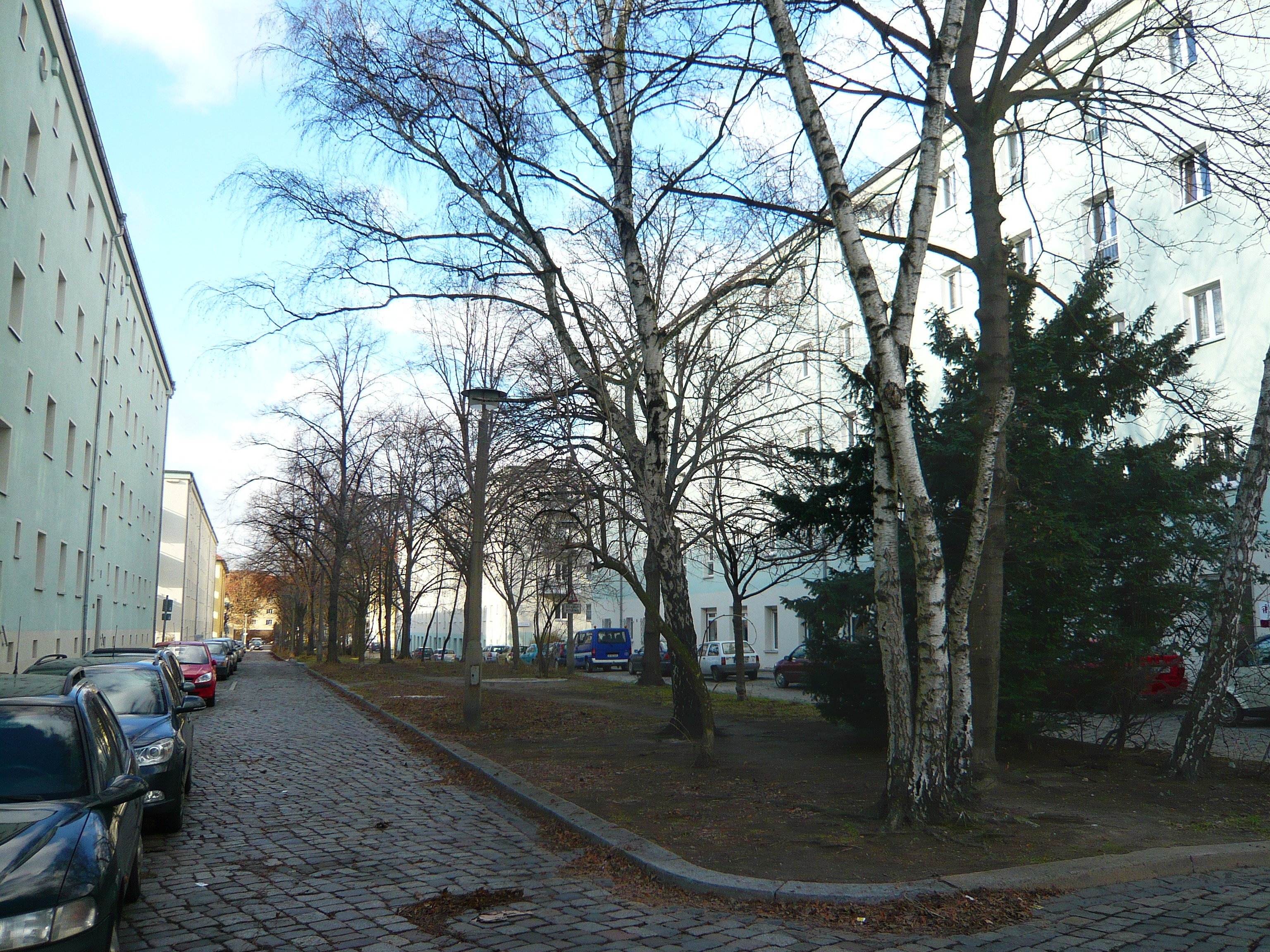 Straße in Prenzlauer Berg: Rudolf-Schwarz-Straße